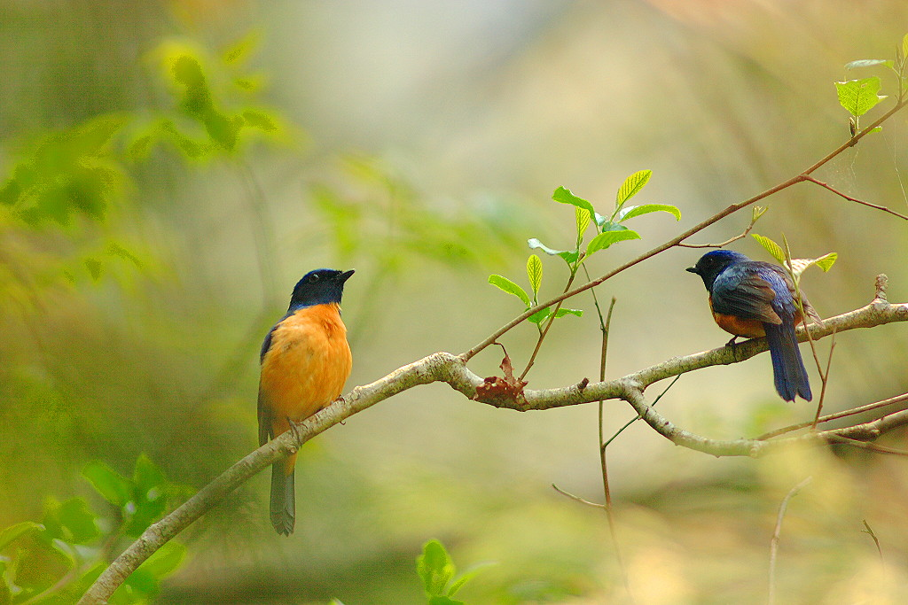 Vivid Niltava Niltava vivida, Taiwan